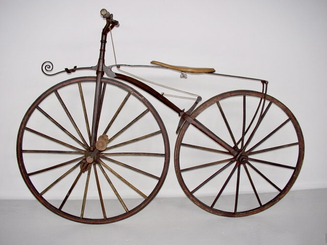 Michaux bicycle 1870